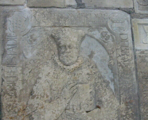 Ausschnitt aus einem Epitaph eines Gesitlichen aus der Familie von Brandt im Eichstätter Dom